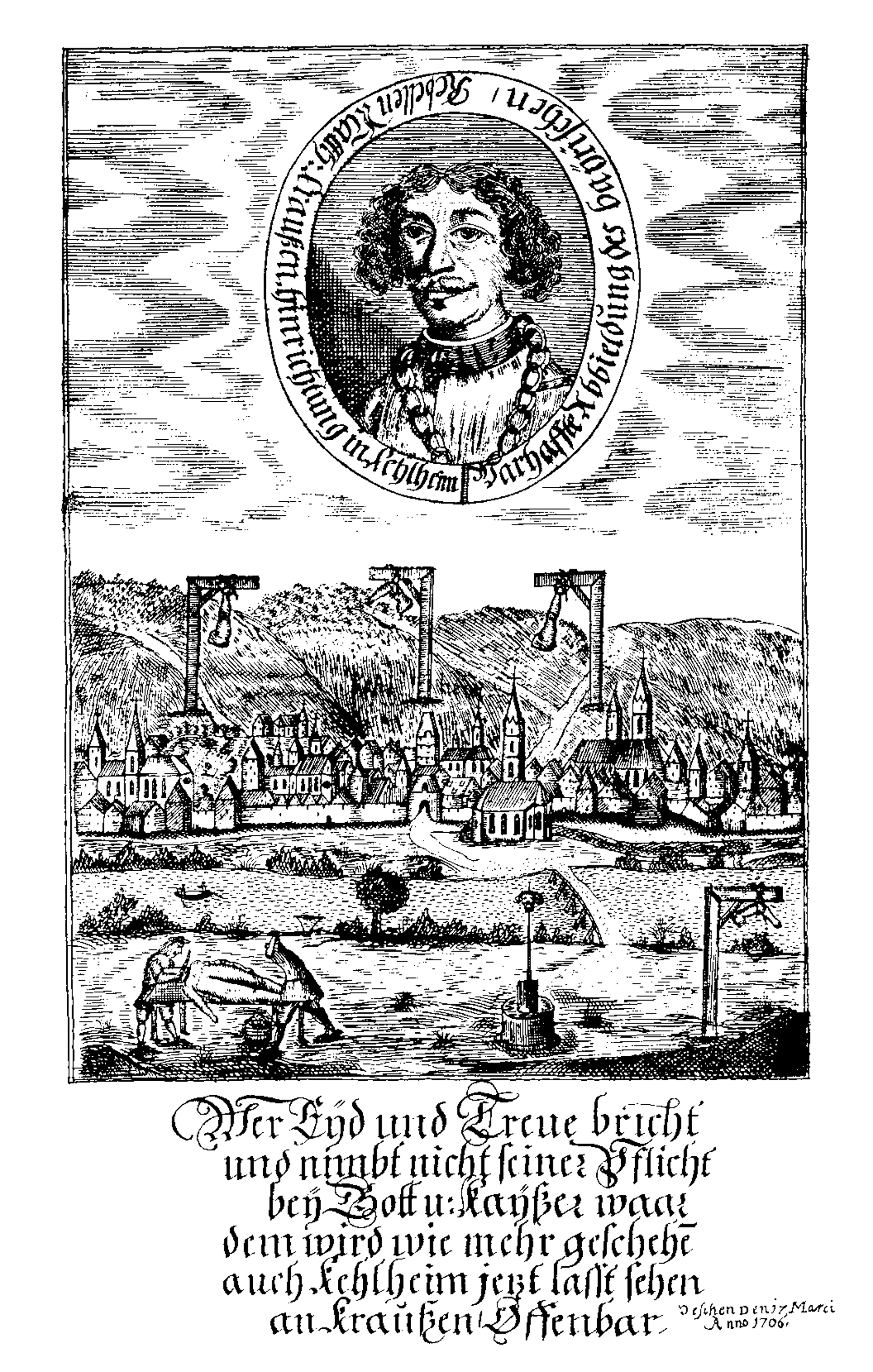 Kupferstich von 1706: Österreichisches „Abschreckungsflugblatt“ über die Enthauptung und Vierteilung des bayerischen Widerstandskämpfers Matthias Kraus zu Kelheim (Kraus-Aufstand)